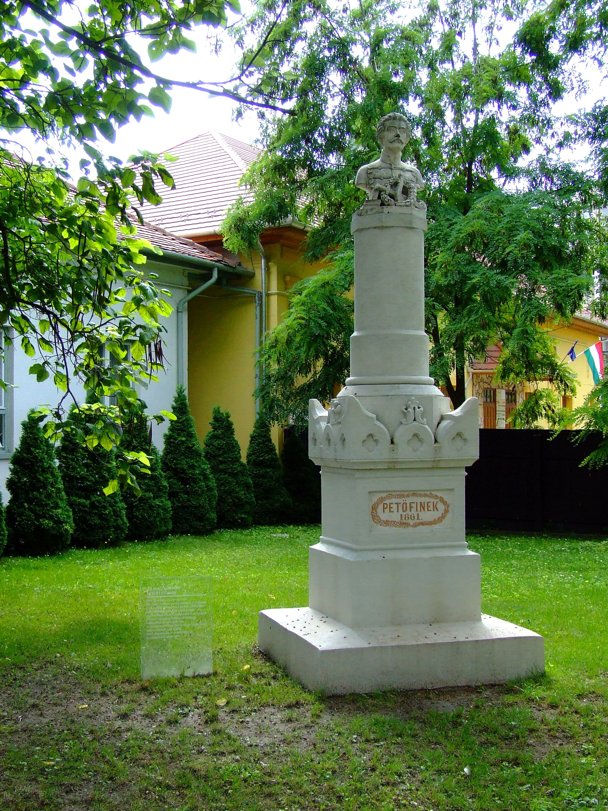 A világ első köztéri Petőfi szobra. Készült a Kiegyezés előtt, 1861-ben. A Gerenday testvérek által készített szobor 1983-óta Petőfi szülőházának udvarán (Kiskőrös, Petőfi tér 6.),-a régi talapzat másolatán,-áll This is a photo of a monument in Hungary. Identifier: 2277